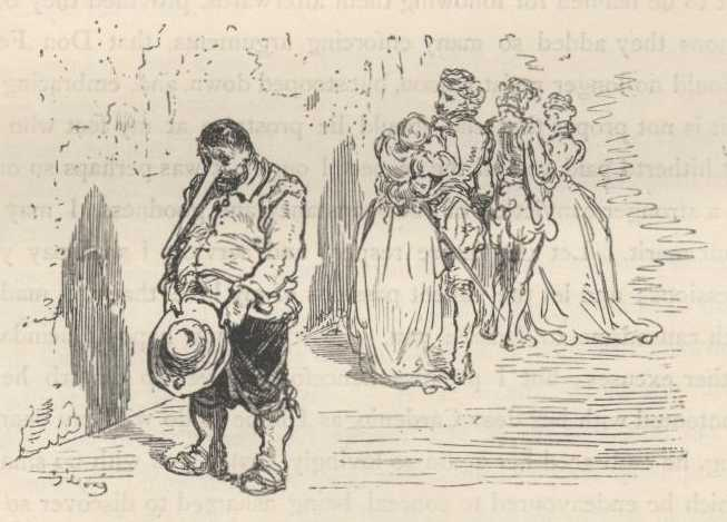 Gustave Doré, ilustração para "Dom Quixote" de Miguel de Cervantes